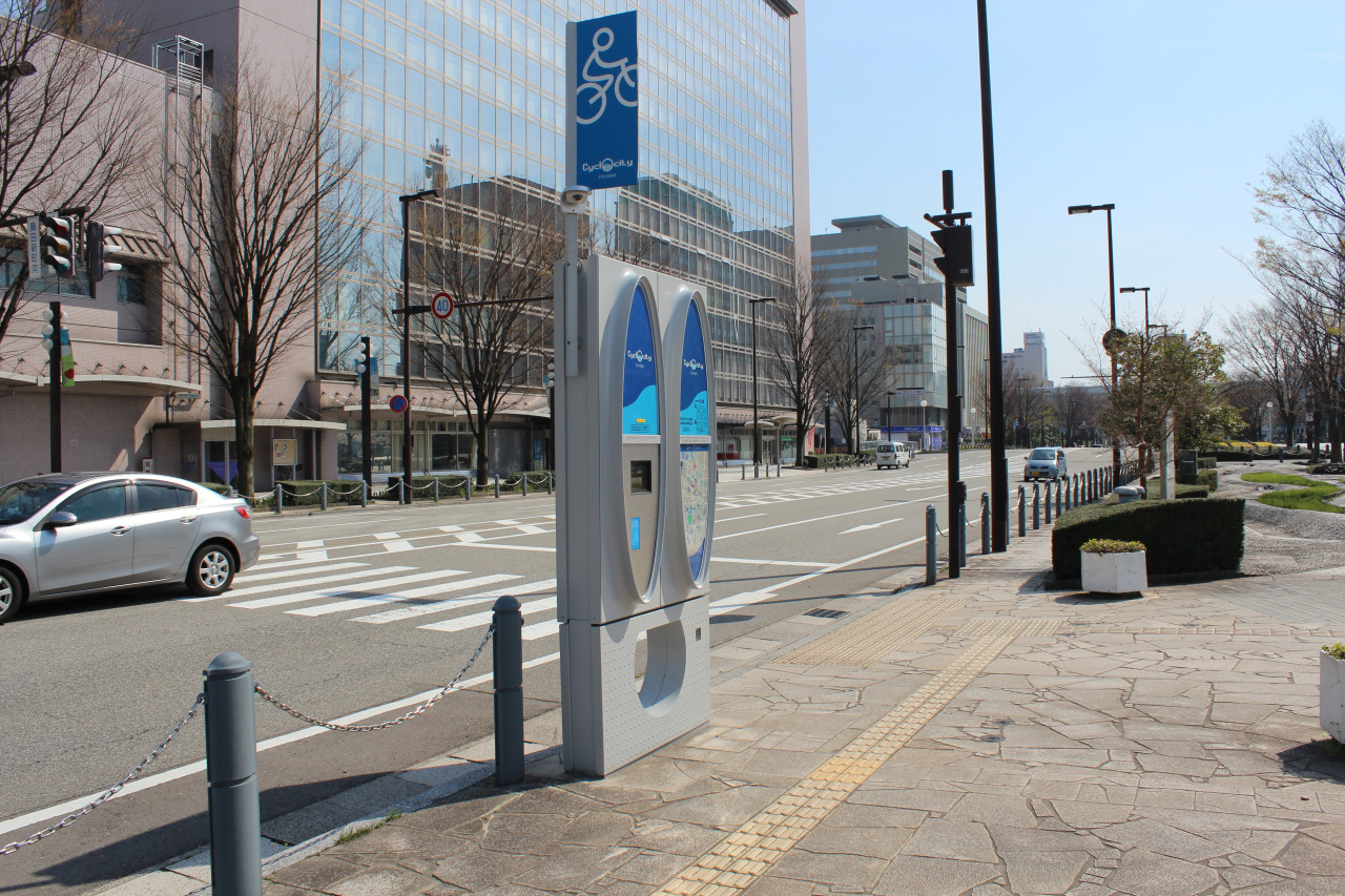 シクロシティ富山 アヴィレ ステーション